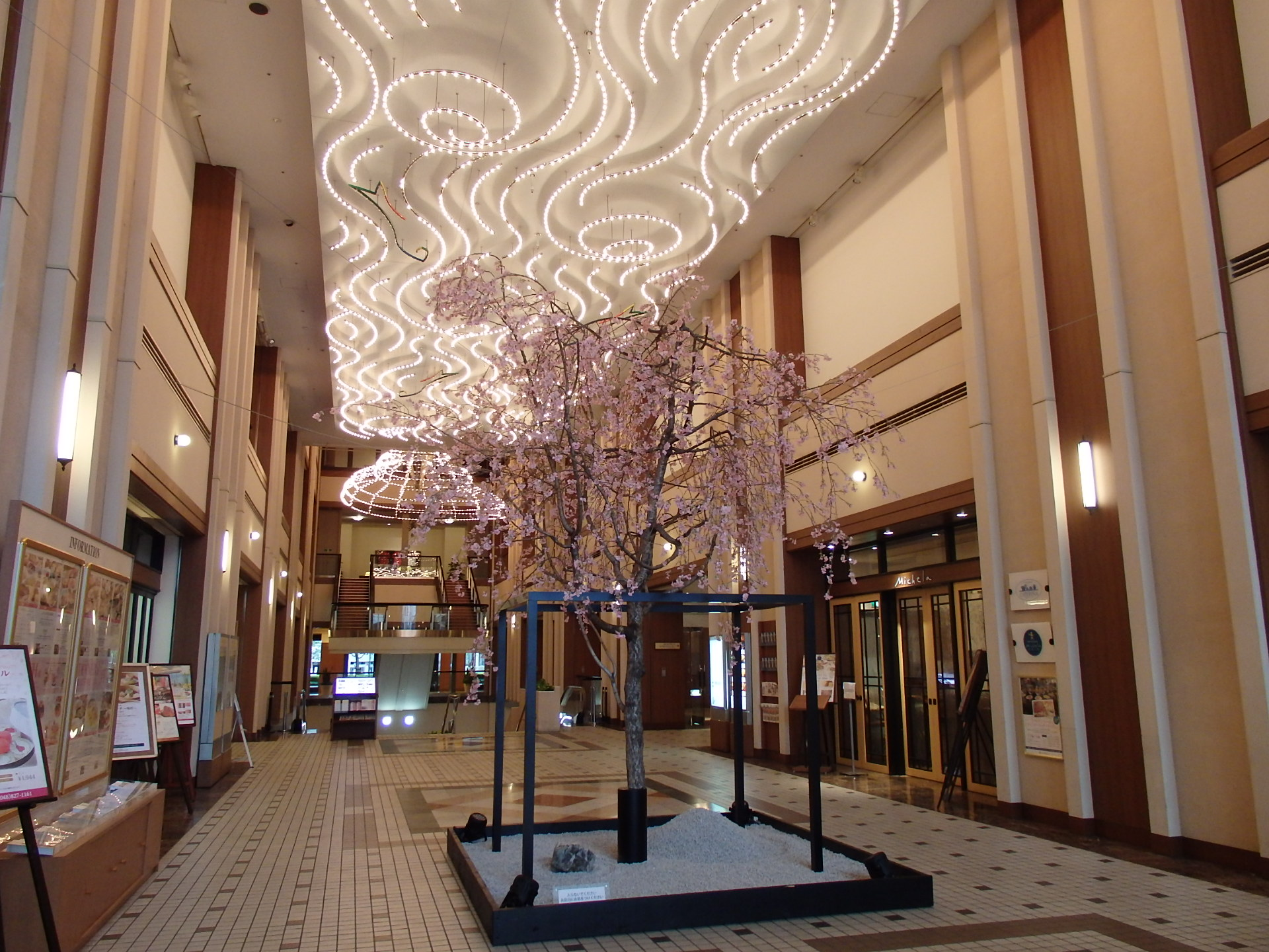 浦和パインズホテル内